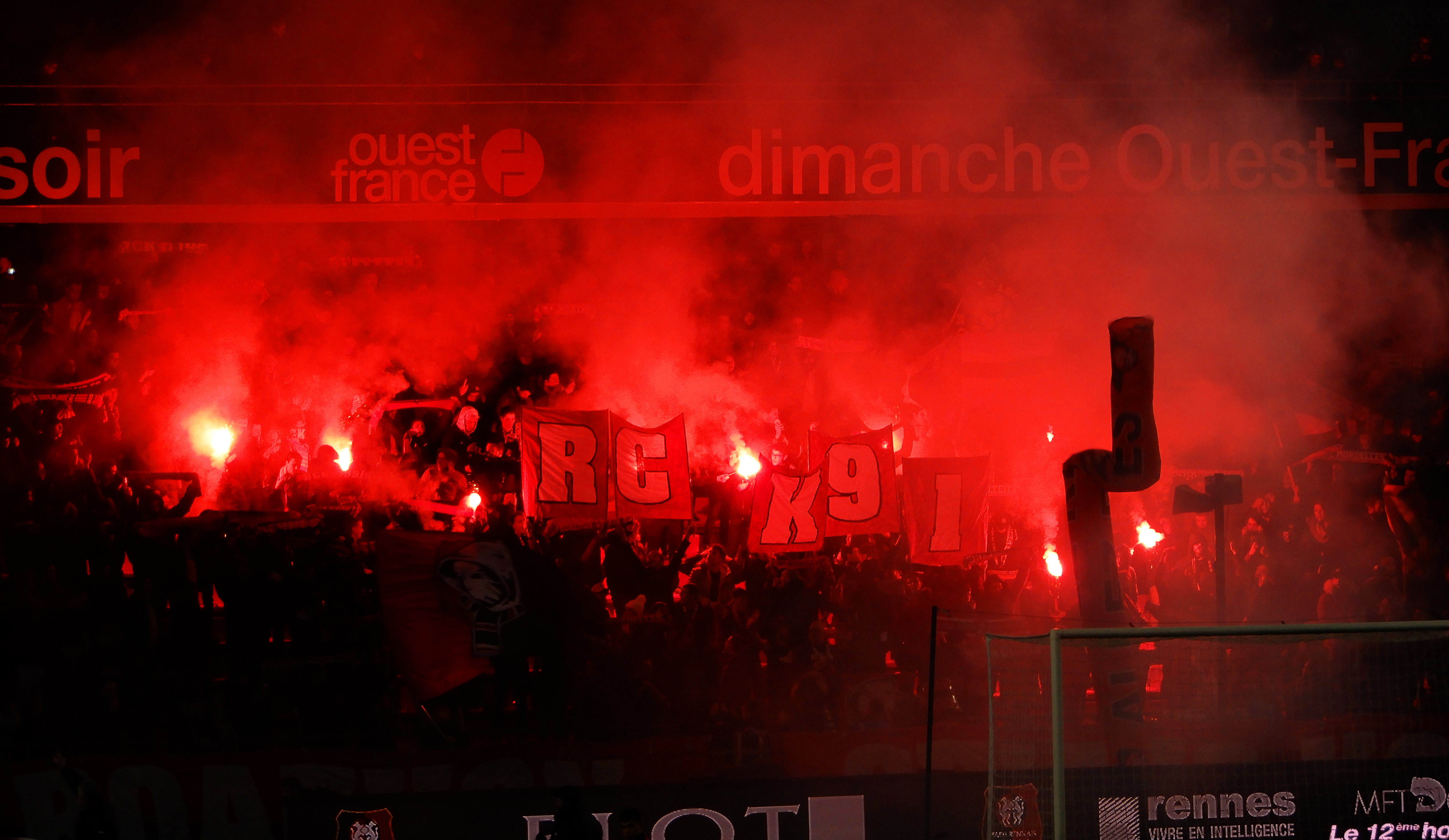 Stade rennais football club - Les supporters